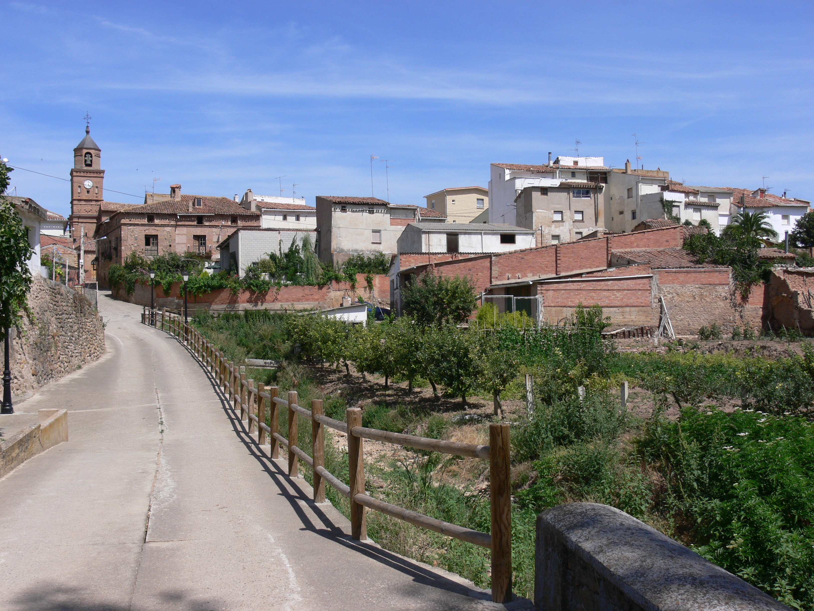 BERGASA. Panorámica de la entrada al pueblo.